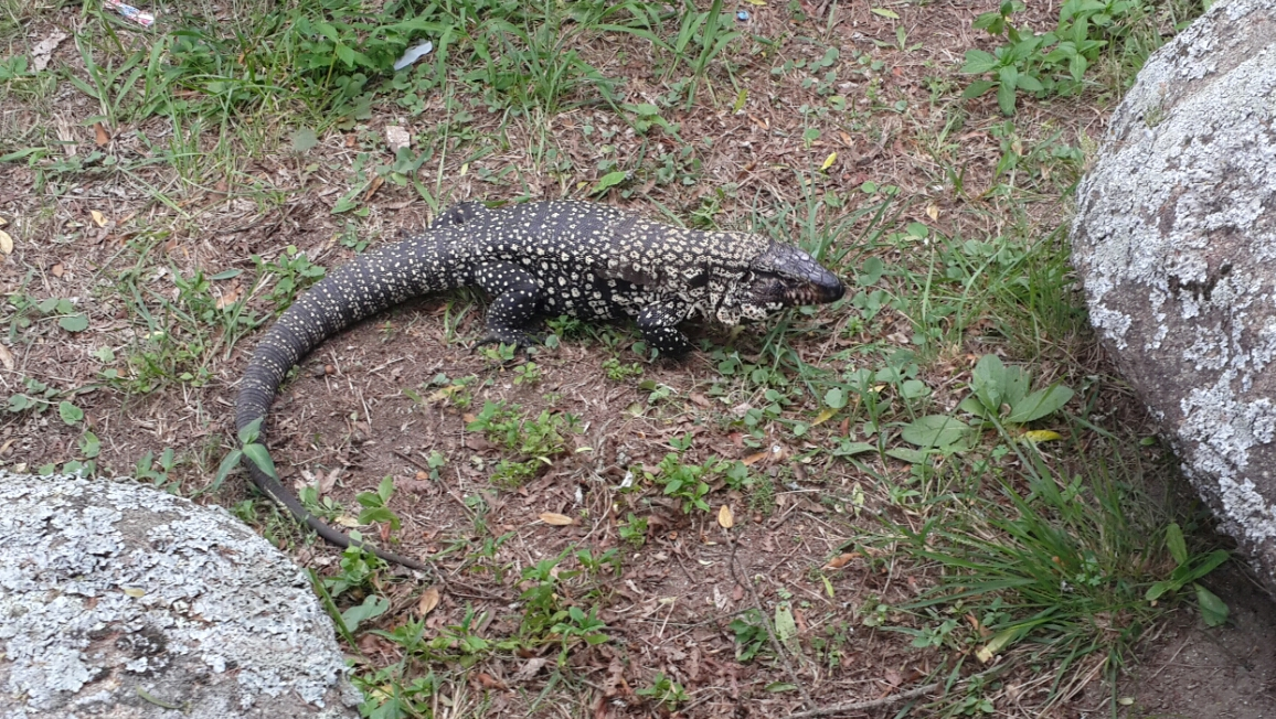 Conocido como "lagarto overo" en Córdoba Argentina, el Tupinambis merianae es endémico del noreste y centro de Argentina.